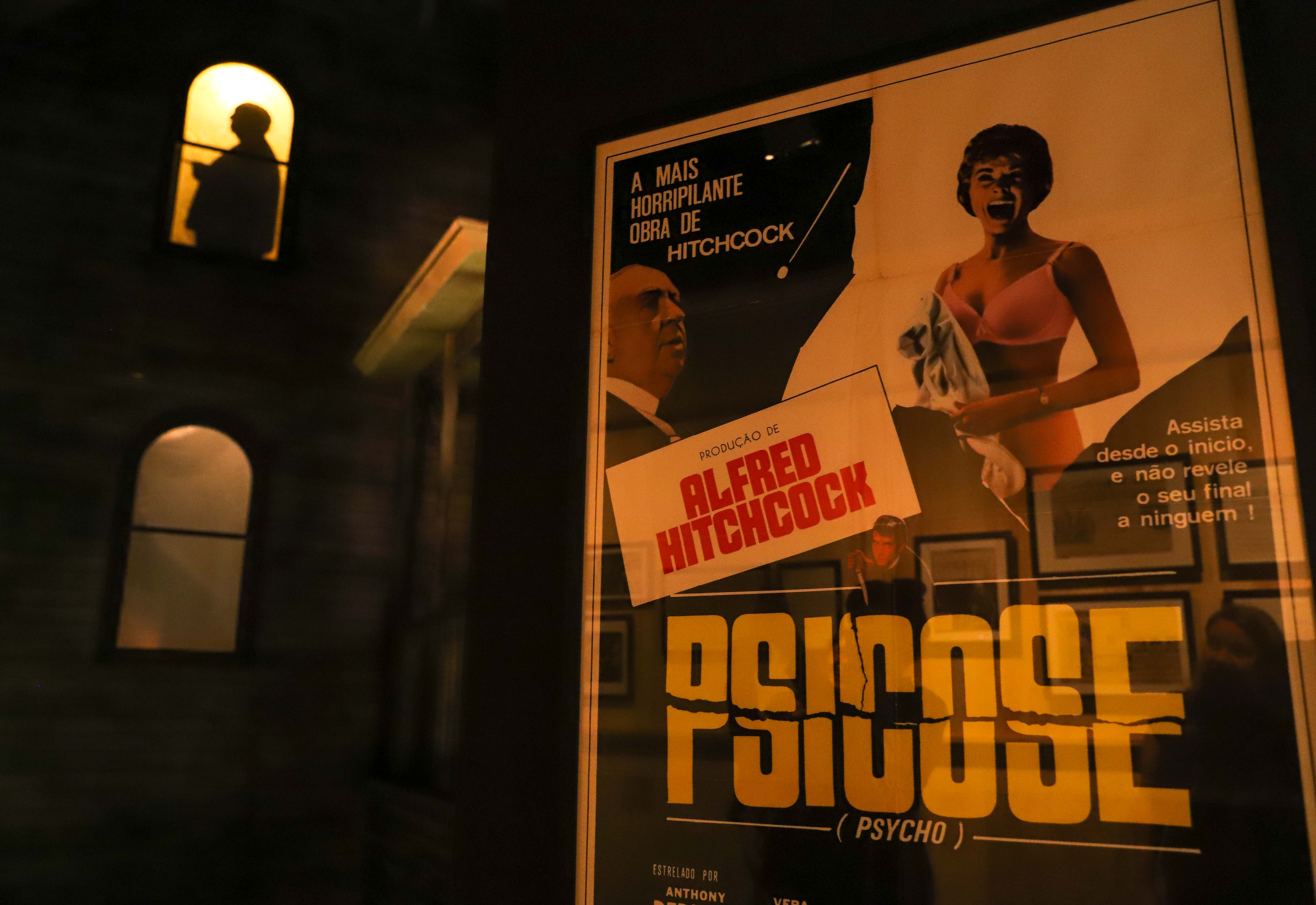 A partir da atmosfera e personalidade do cineasta considerado mestre do suspense, o MIS apresenta a exposição Hitchcock – Bastidores do suspense. Local: São Paulo/SP Data: 25/07/2018 Foto: Governo do Estado de São Paulo